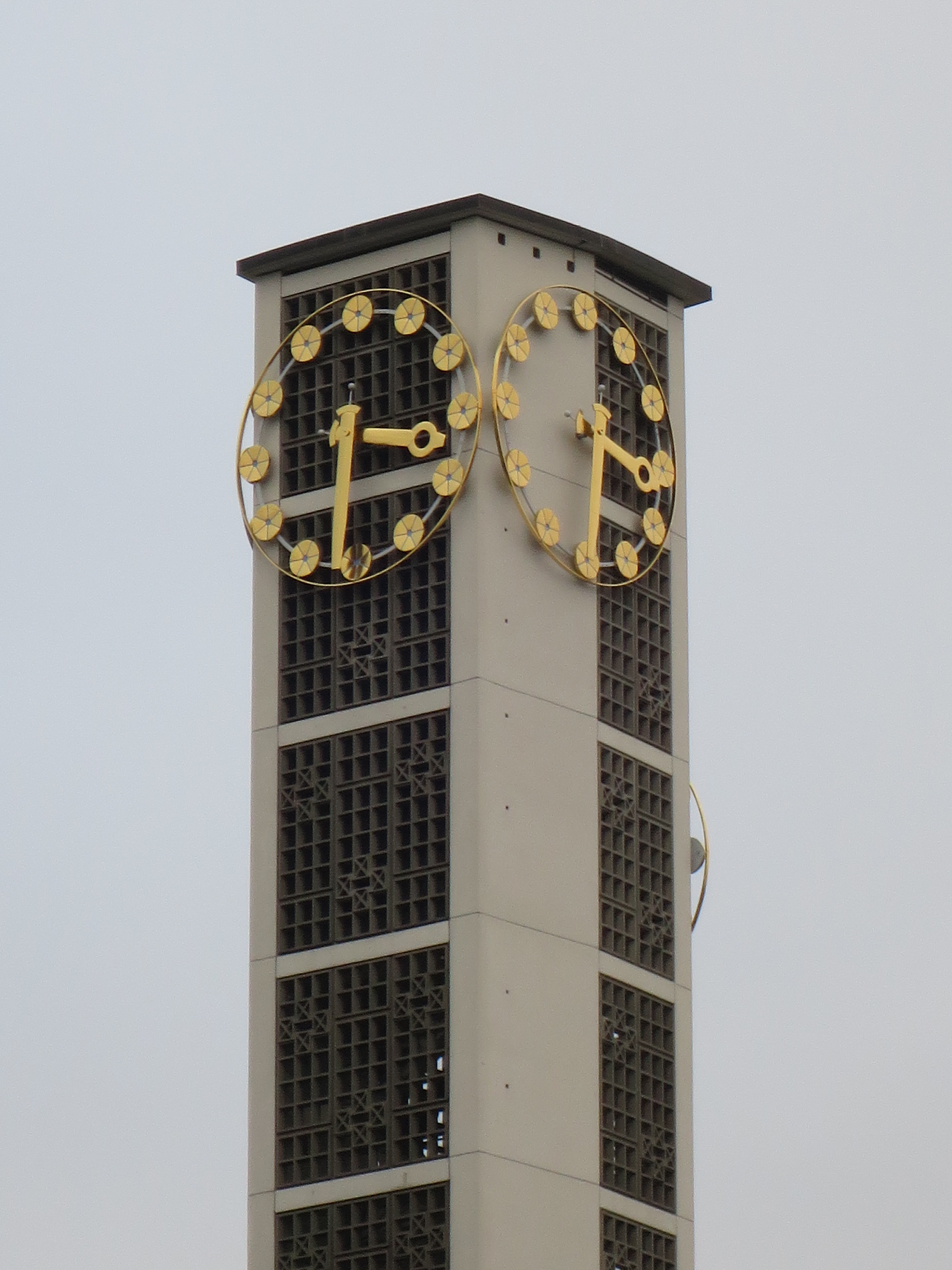 Neue Kirche Altstetten